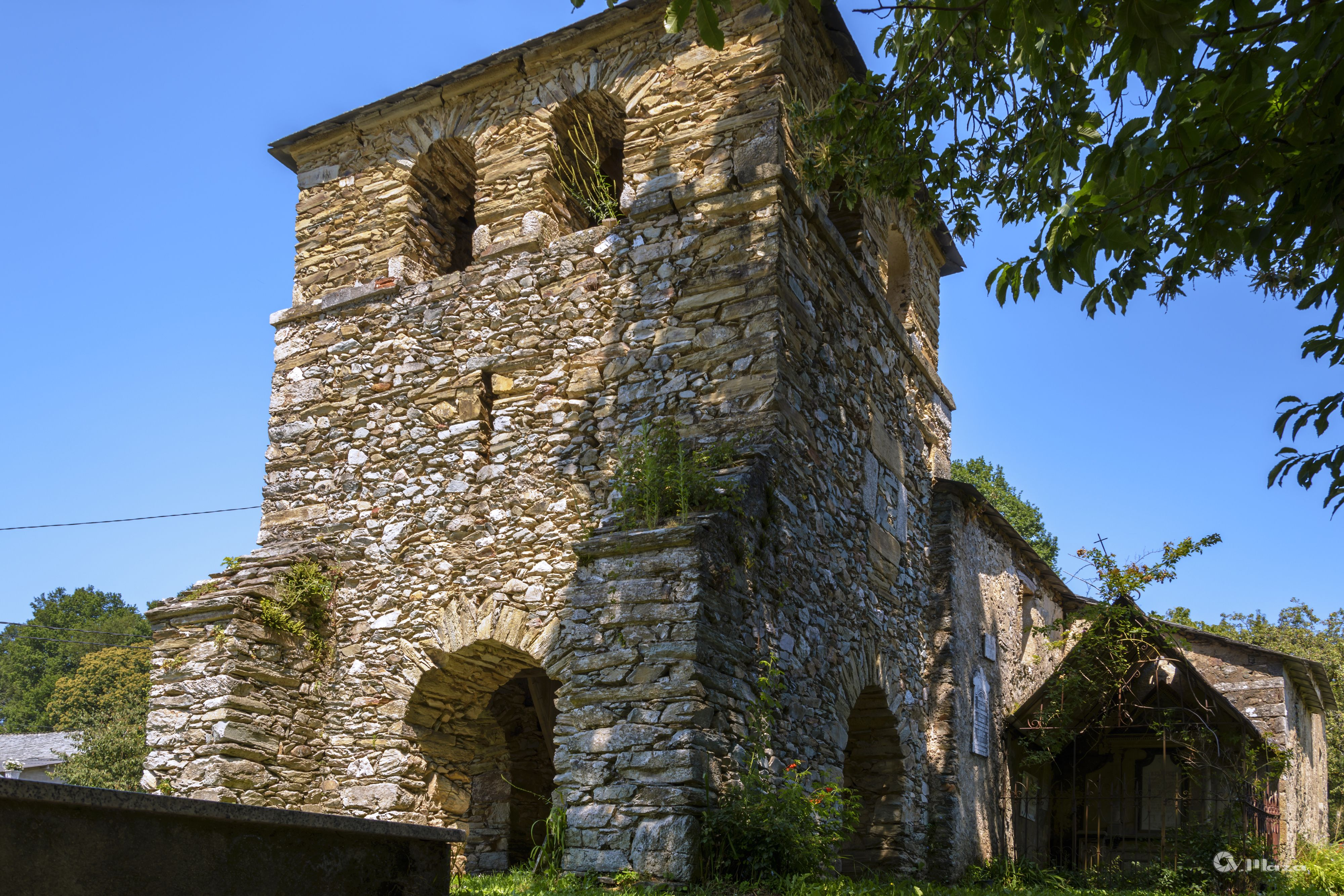 Igrexa San Martiño de Neira de Rei - Baralla - Lugo